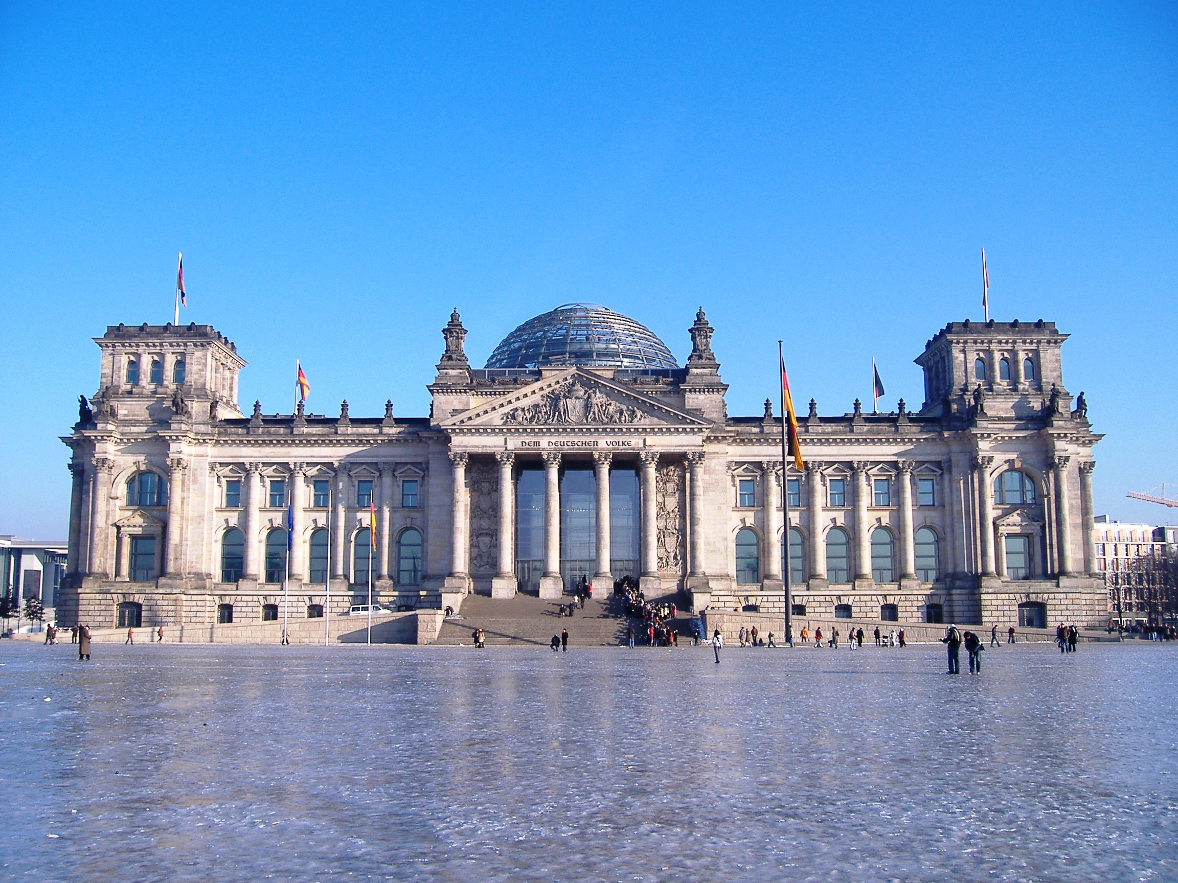 Reichstag im Winter